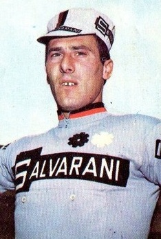 Il ciclista Cipriano Chemello